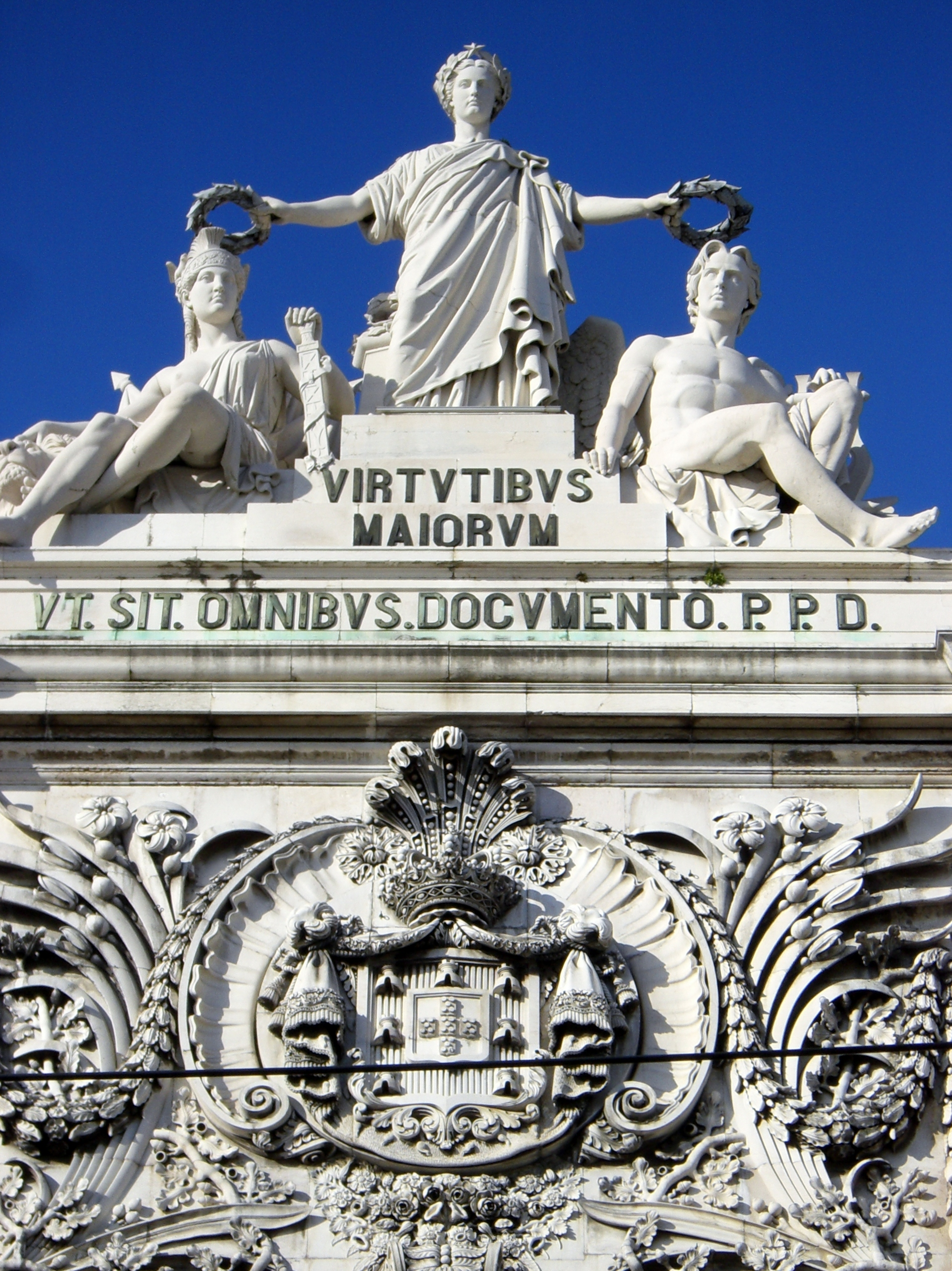 Monumento na Rua Augusta, em Lisboa.